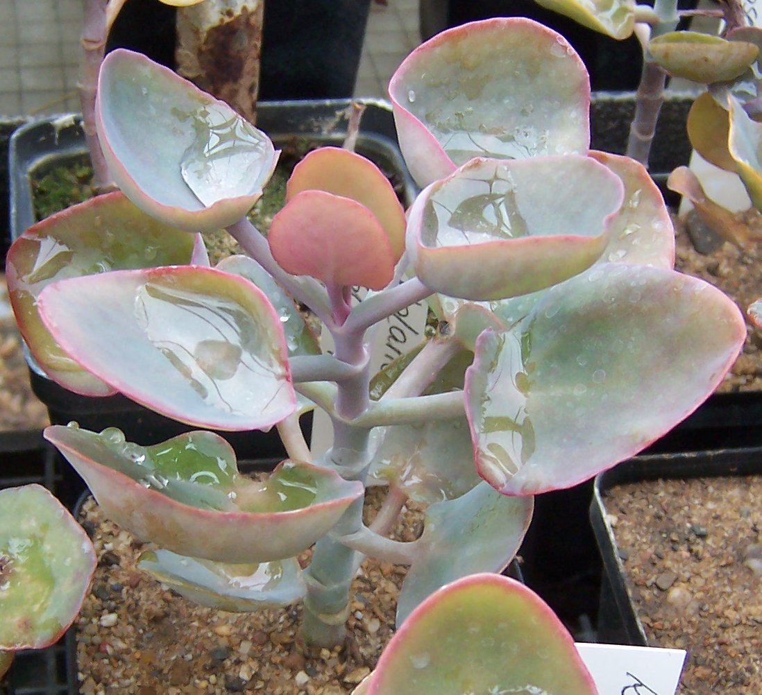 Kalanchoe synsepala, young plant